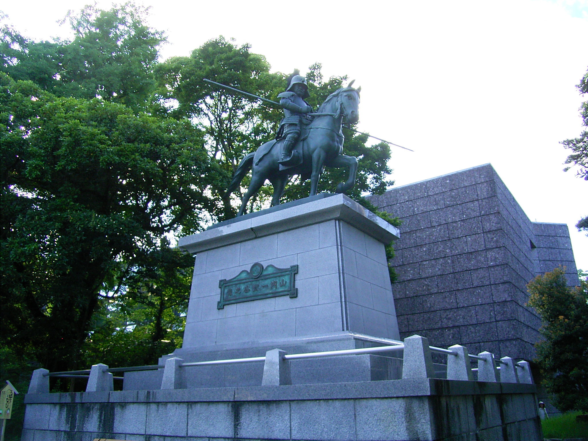 Yamanouchi_Kazutoyo(山内一豊)